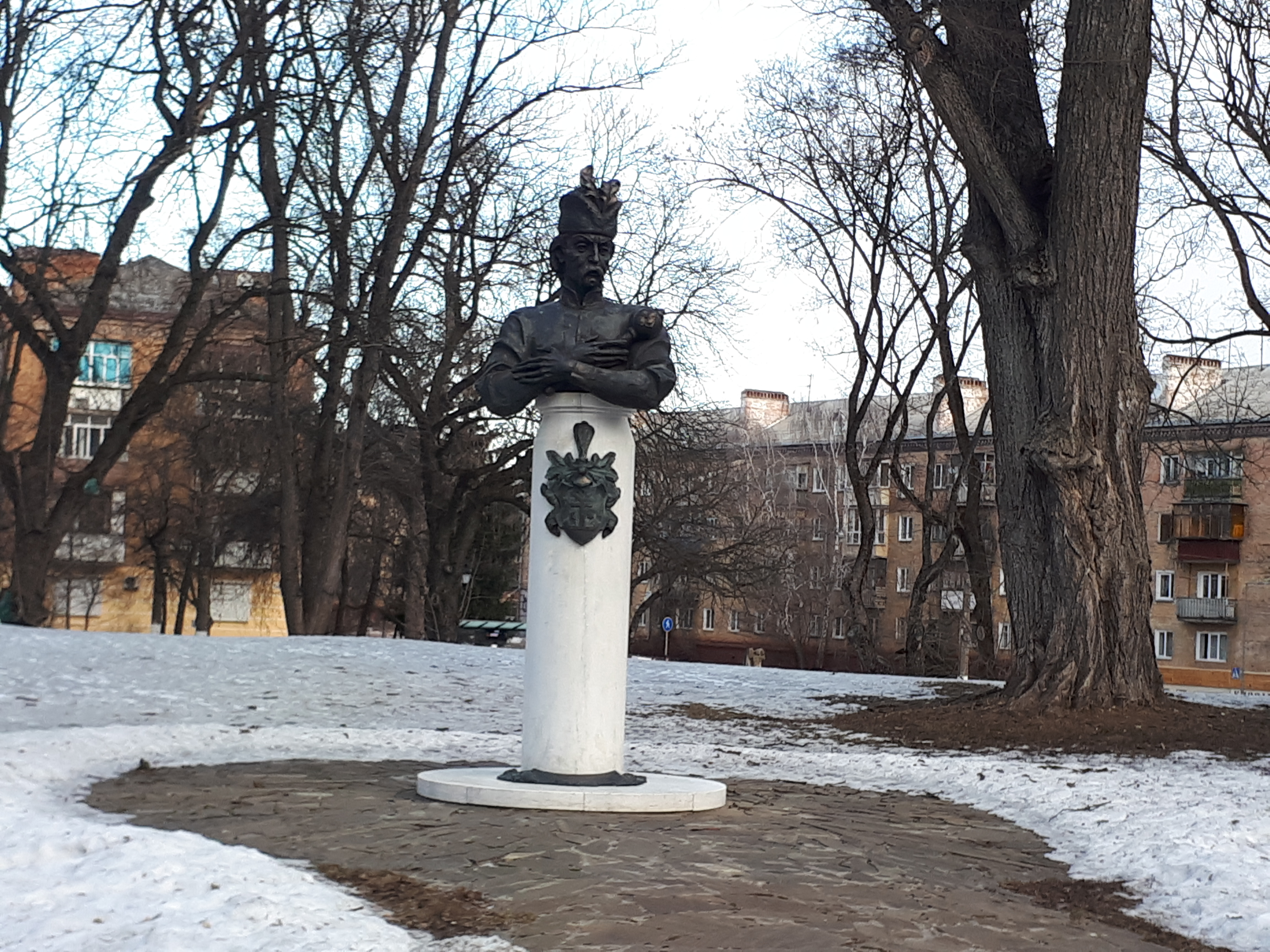 Пам'ятник гетьману Івану Мазепі в момент офіційного відкриття 7 травня 2016 року